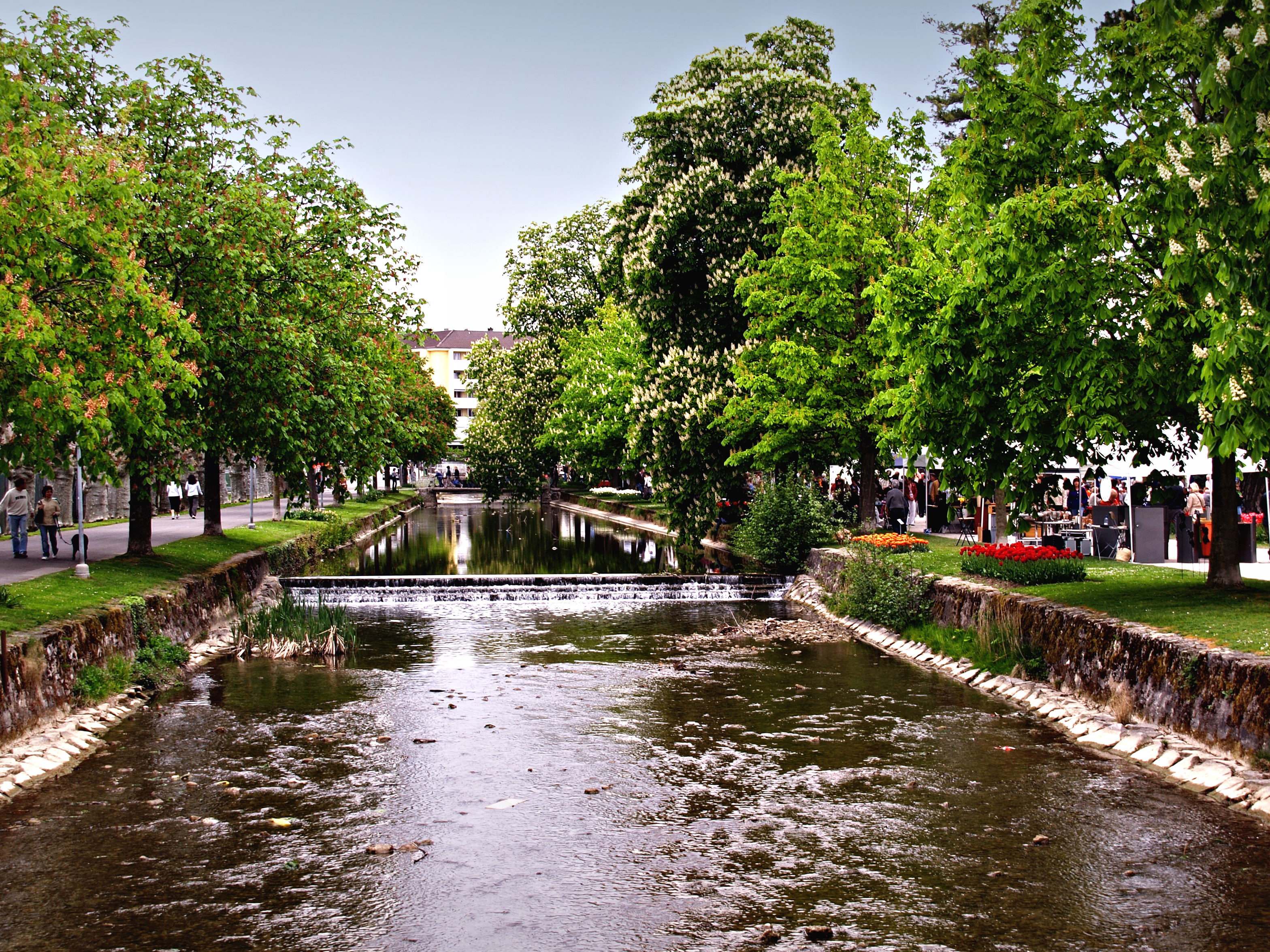 Morges (Suisse) - Rivière Morges longeant le parc de l'Indépendance avant de se jeter dans le lac Léman